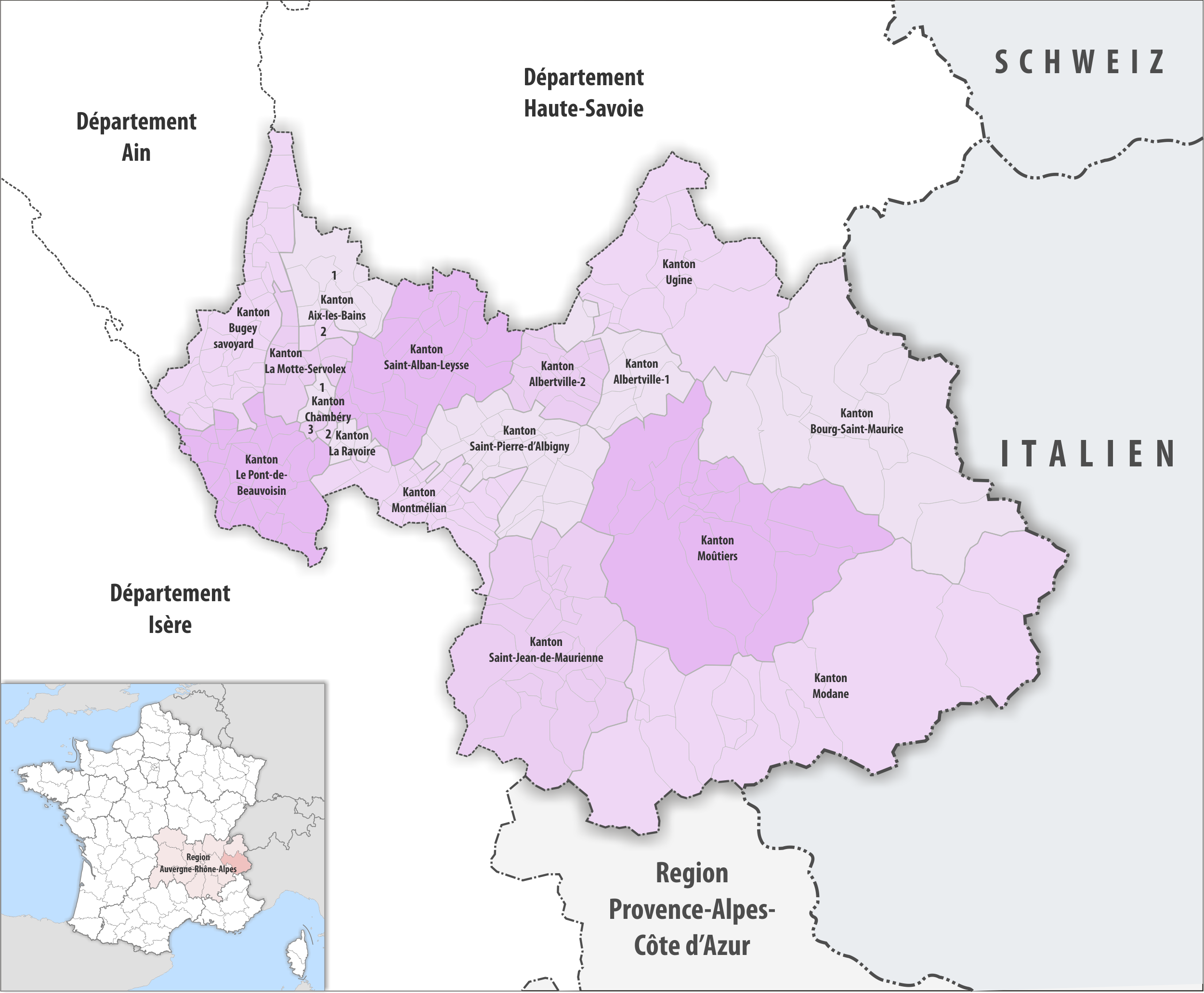 Gemeinden und Kantone im Departement Savoie